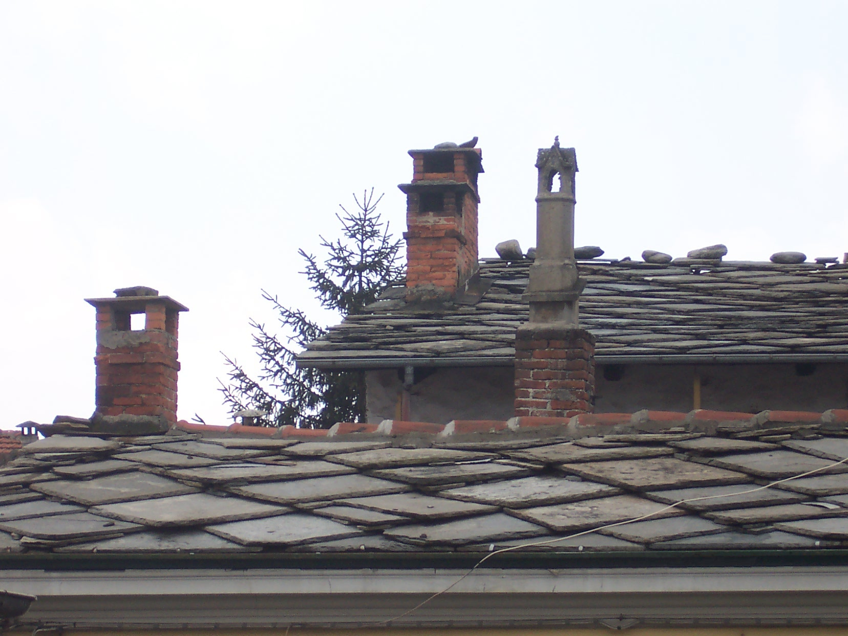 Típico techo de las casas de la Val Pellice. Autor: Alfredobi